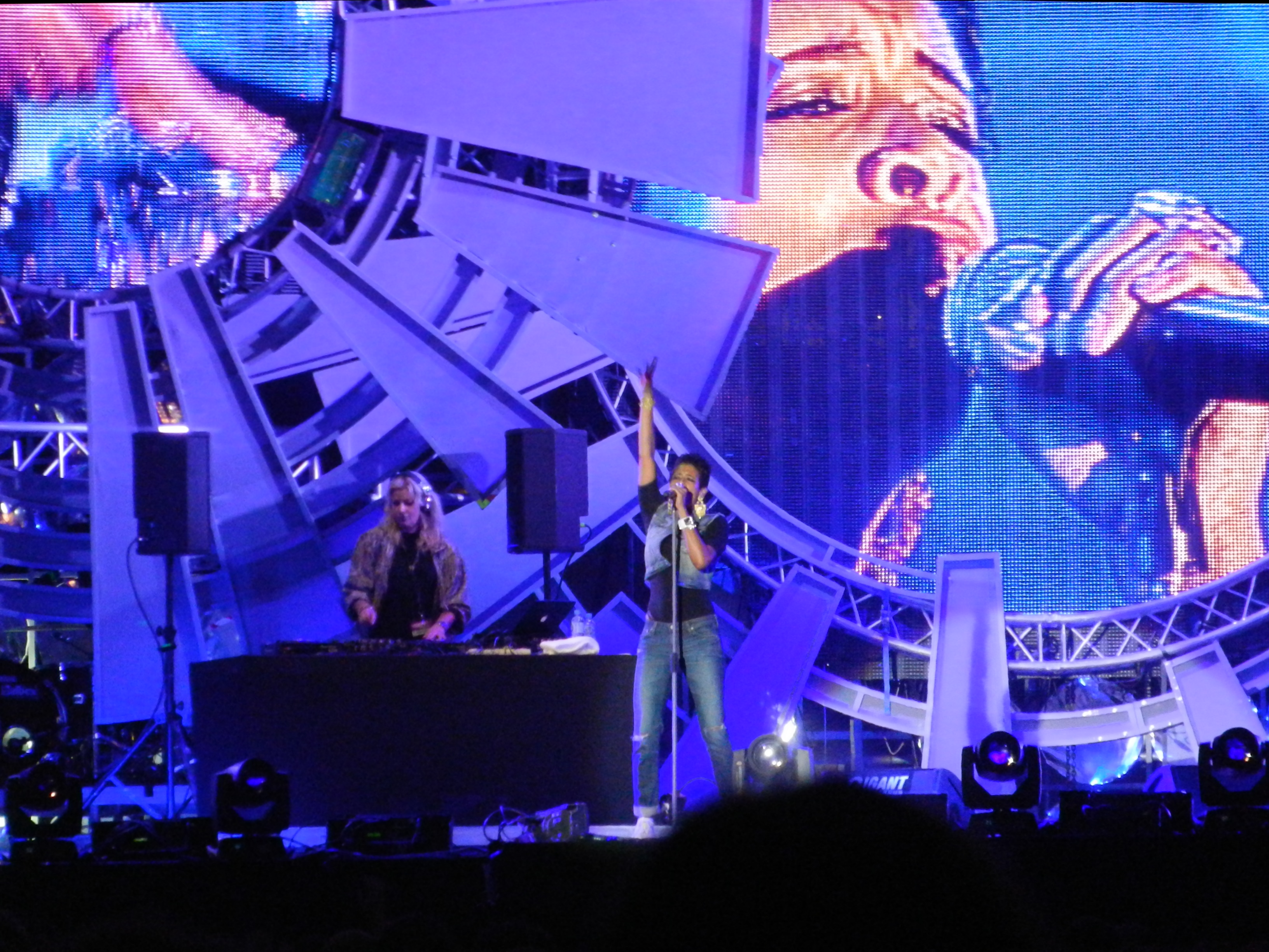 Kelis podczas koncertu "Wianki nad Wisłą 2011", Podzamcze, Warszawa 25.06.2011.